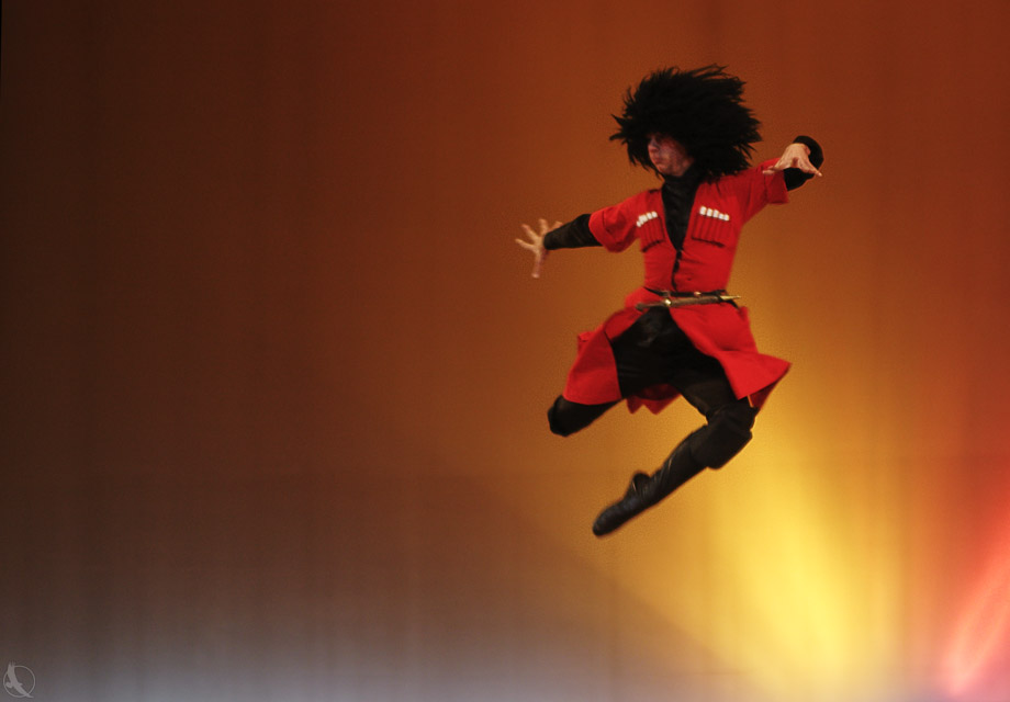 Georgian dance